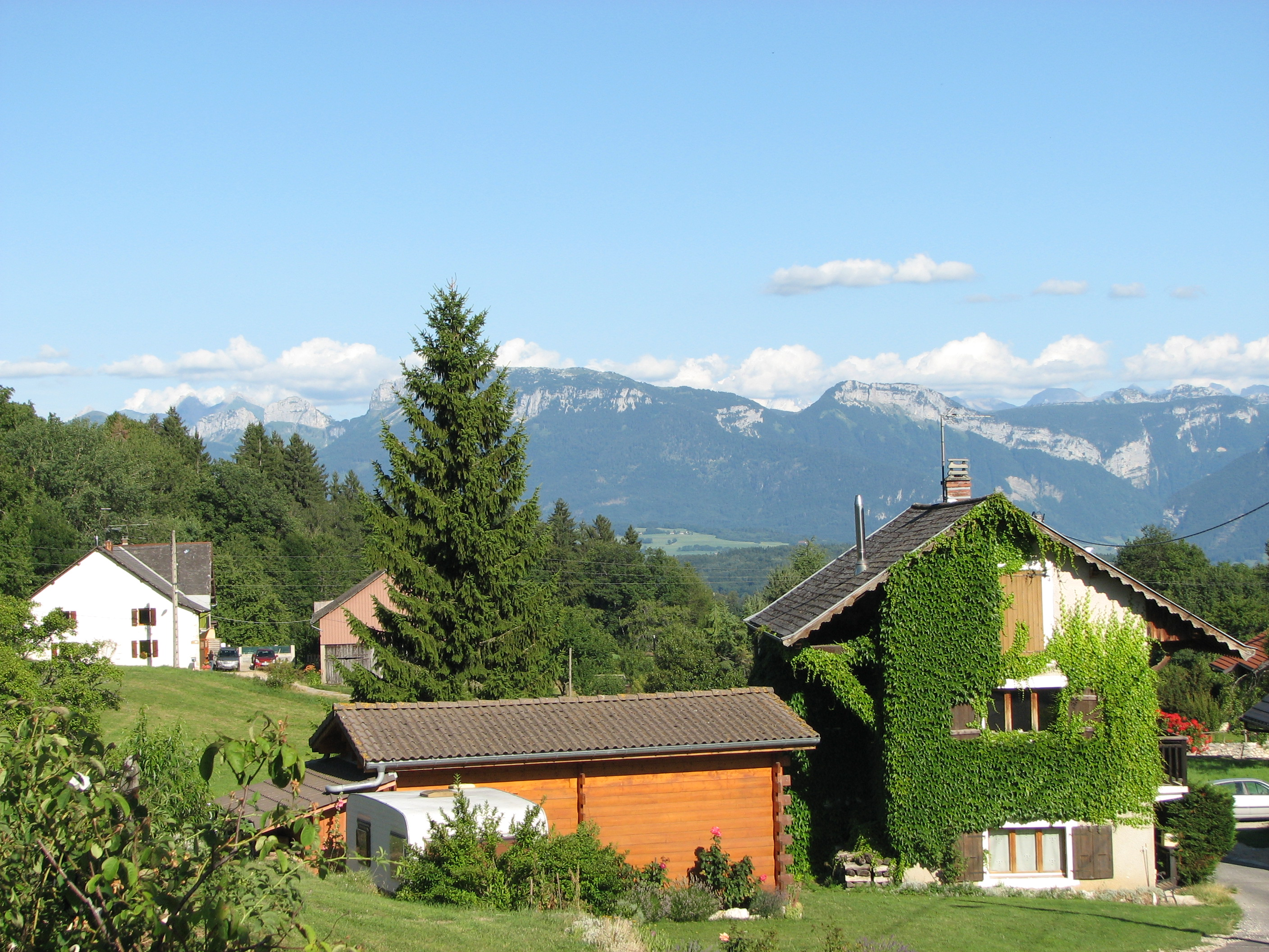 Hameau de l'Abergement, à Cruseilles (74)